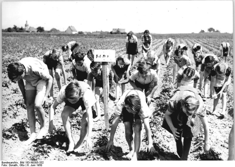 ADN-ZB Donath Sci-Schm 6.6.1950 Bez. Karl-Marx-Stadt: Schuljugend des Zwickauer Kreises Schönfels hilft den Bauern bei der Kartoffelkäfervernichtung.